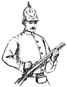 Laden des Zündnadelgewehrs Fig.15